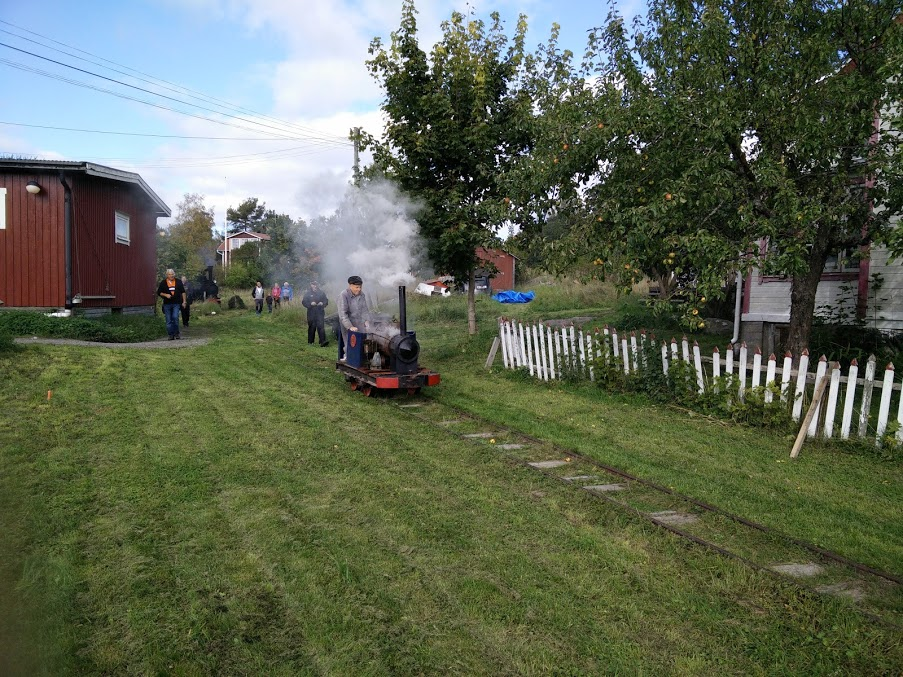 Ångdressinen i aktion under Möja Jernvägs 50 års jubileum